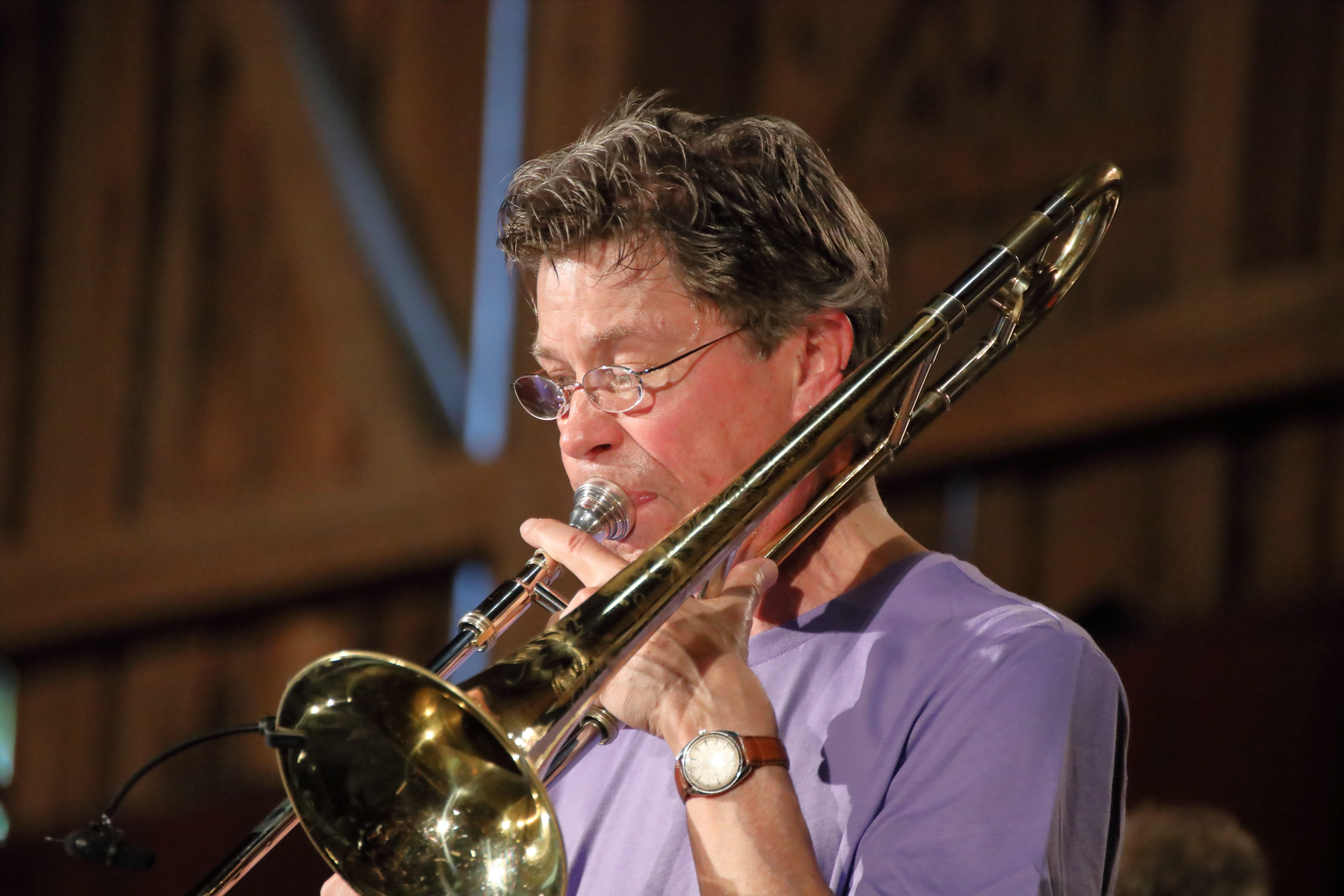 Ray Anderson (tb), Han Bennink (dr), Ernst Glerum (db) und Paul van Kemenade (alto sax) auf dem INNtöne Jazzfestival 2019.